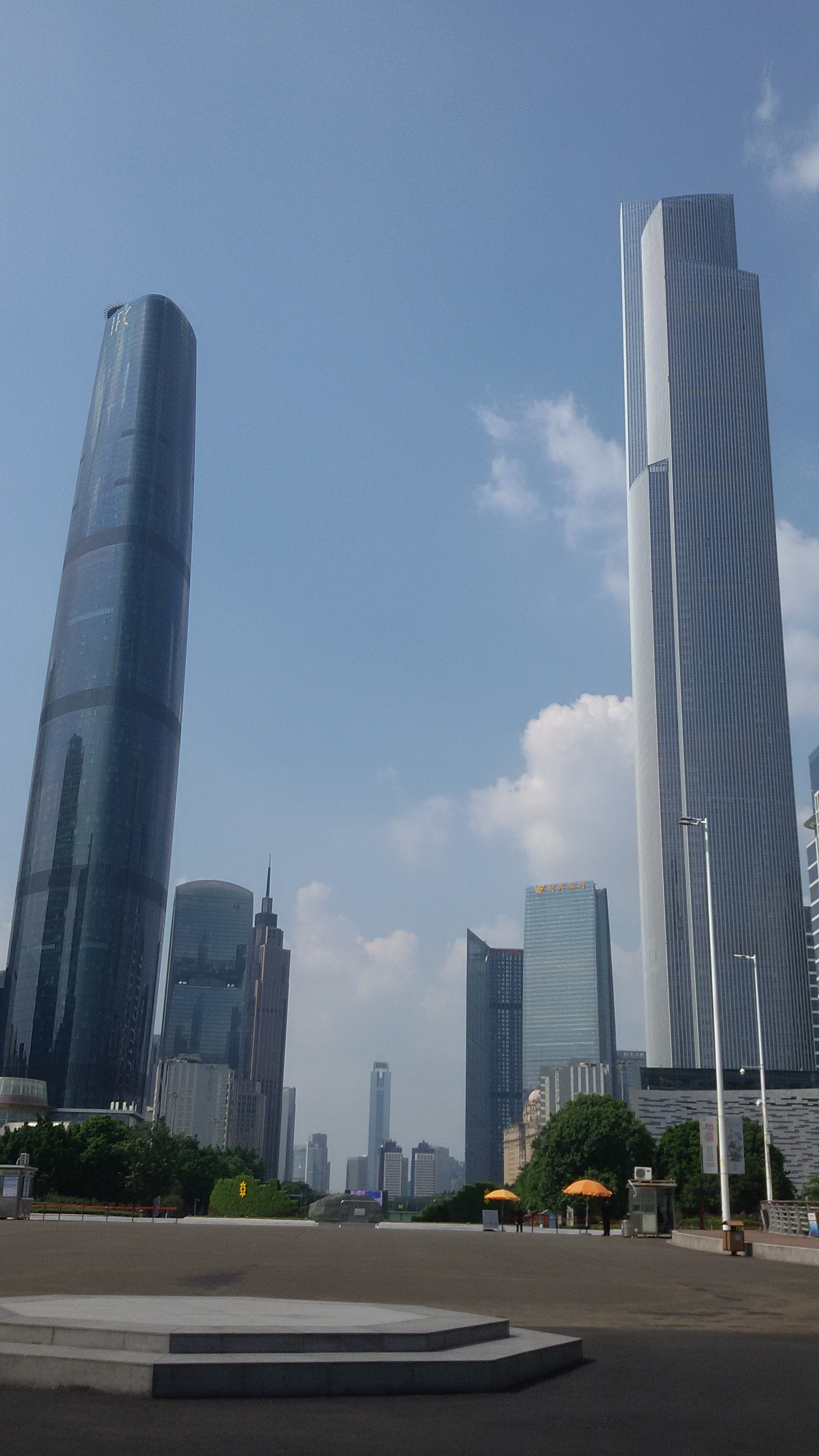 粵語: 廣州雙子塔（西塔同東塔）